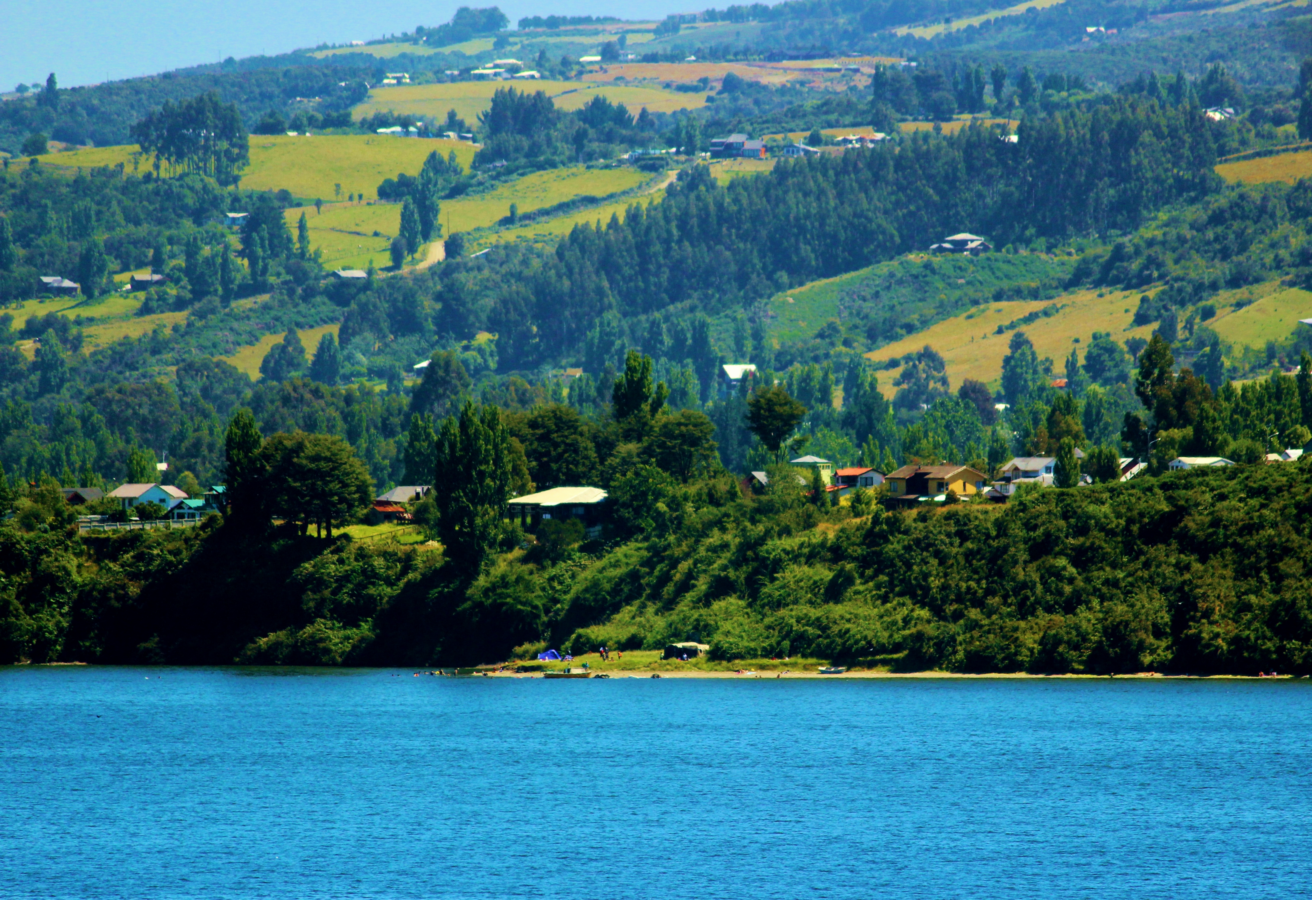 Castro, Chile